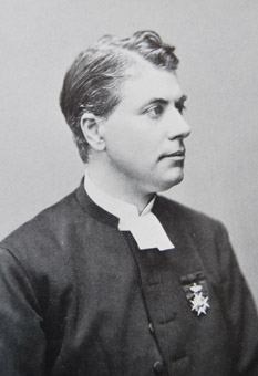 Foto från när Björnström blev domprost.